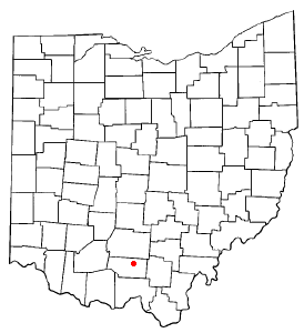 Looks like a map